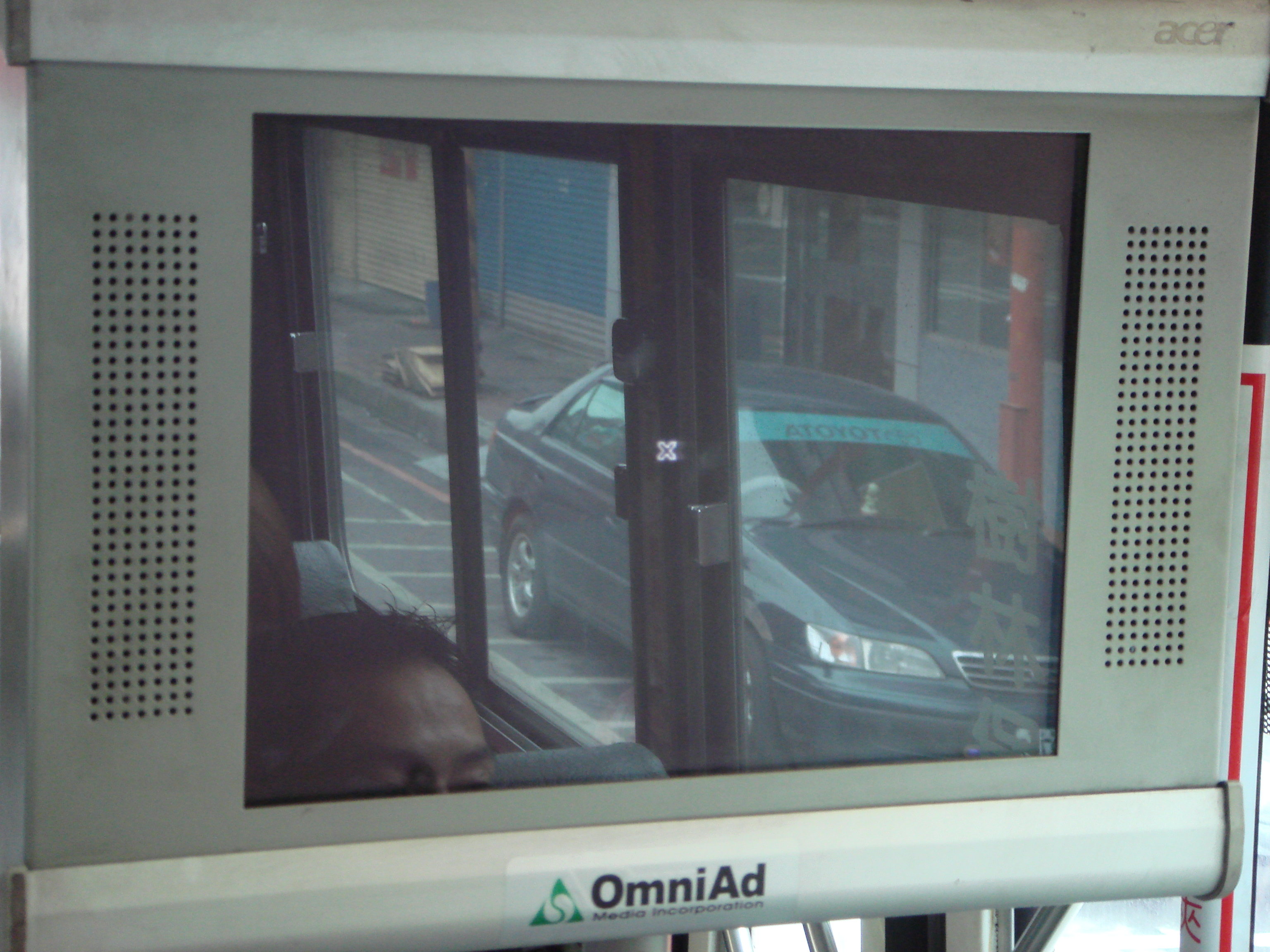 合和國際(合和集團)BeeTV使用的宏碁液晶顯示器，右上角貼宏碁商標銘板，下方貼合和國際商標貼紙。